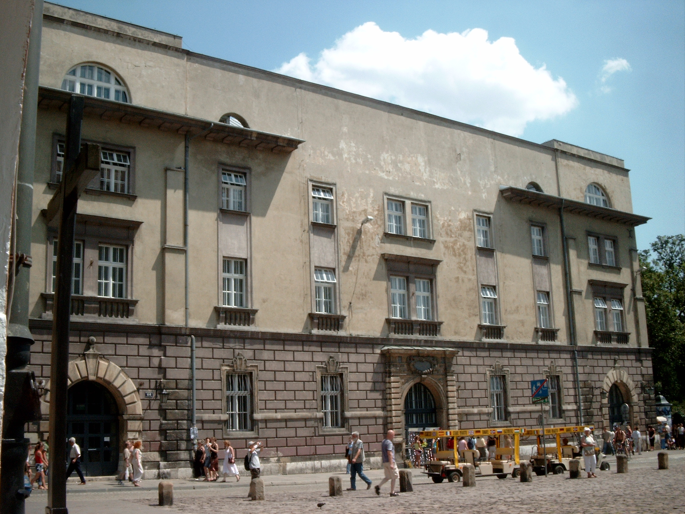 Arsenał królewski w Krakowie, ul. Grodzka